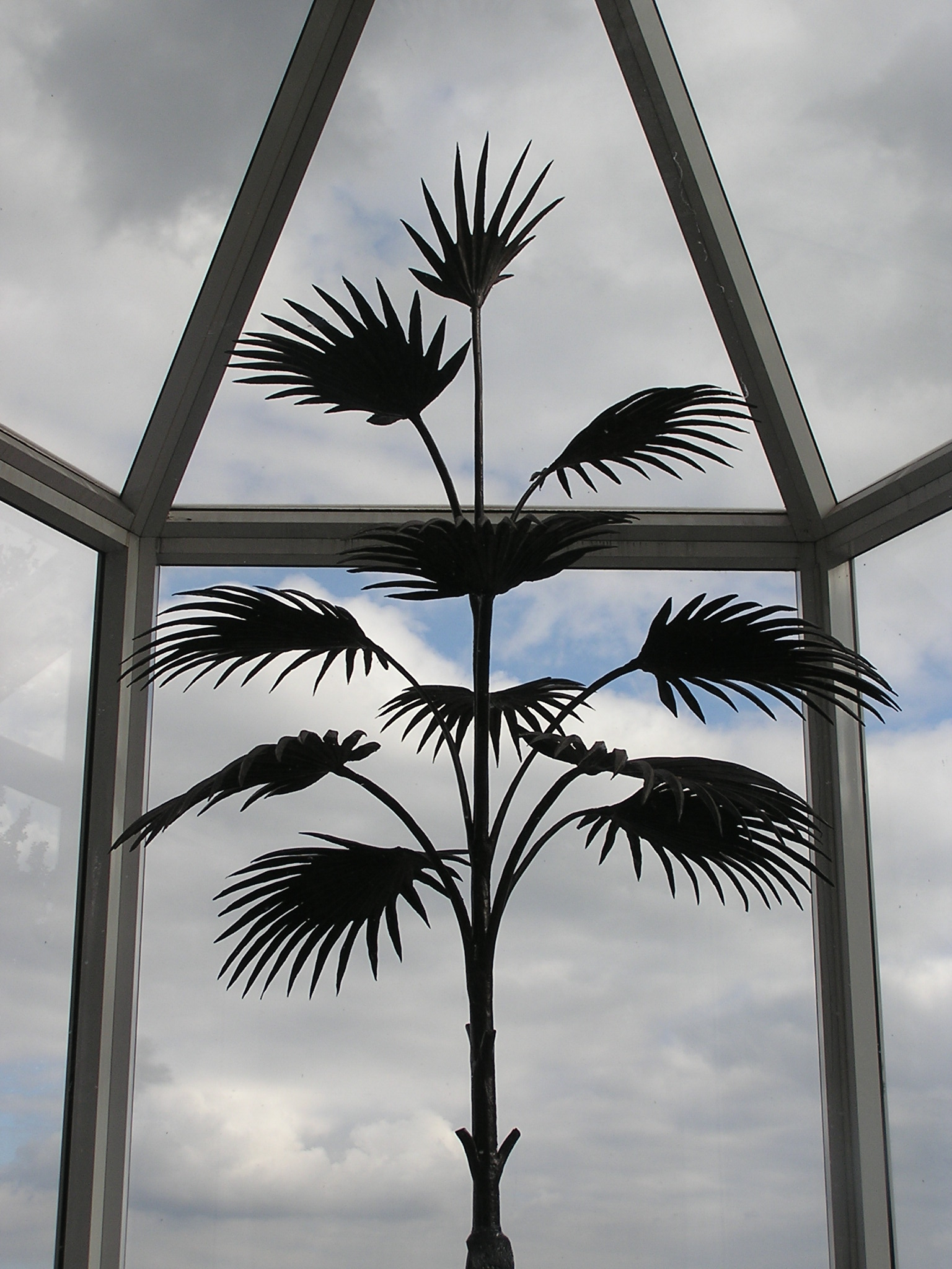 Копия Пальмы Мерцалова (XIX век) в Донецке Пальма Мерцалова